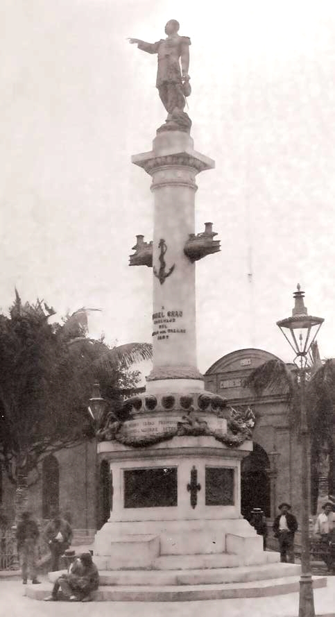 Monumento en homenaje a Miguel Grau, en el puerto del Callao. Principios del siglo XX.